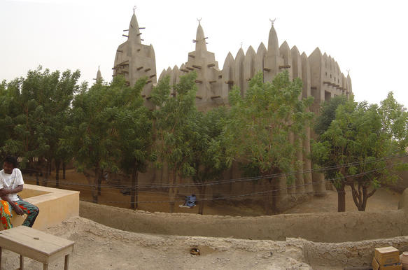 Mosque in Mopti, Mali